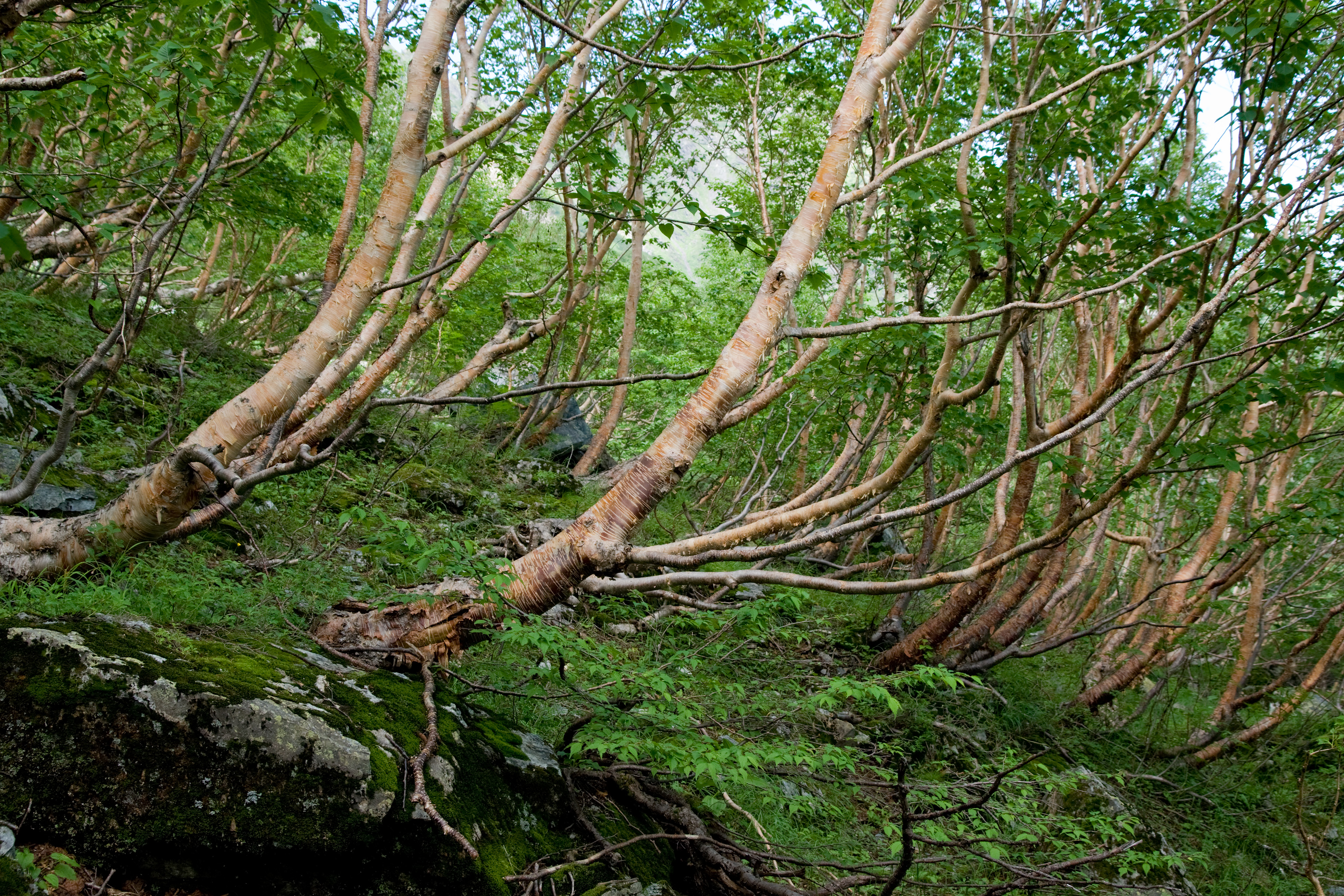 ダケカンバ (学名:Betula ermanii)